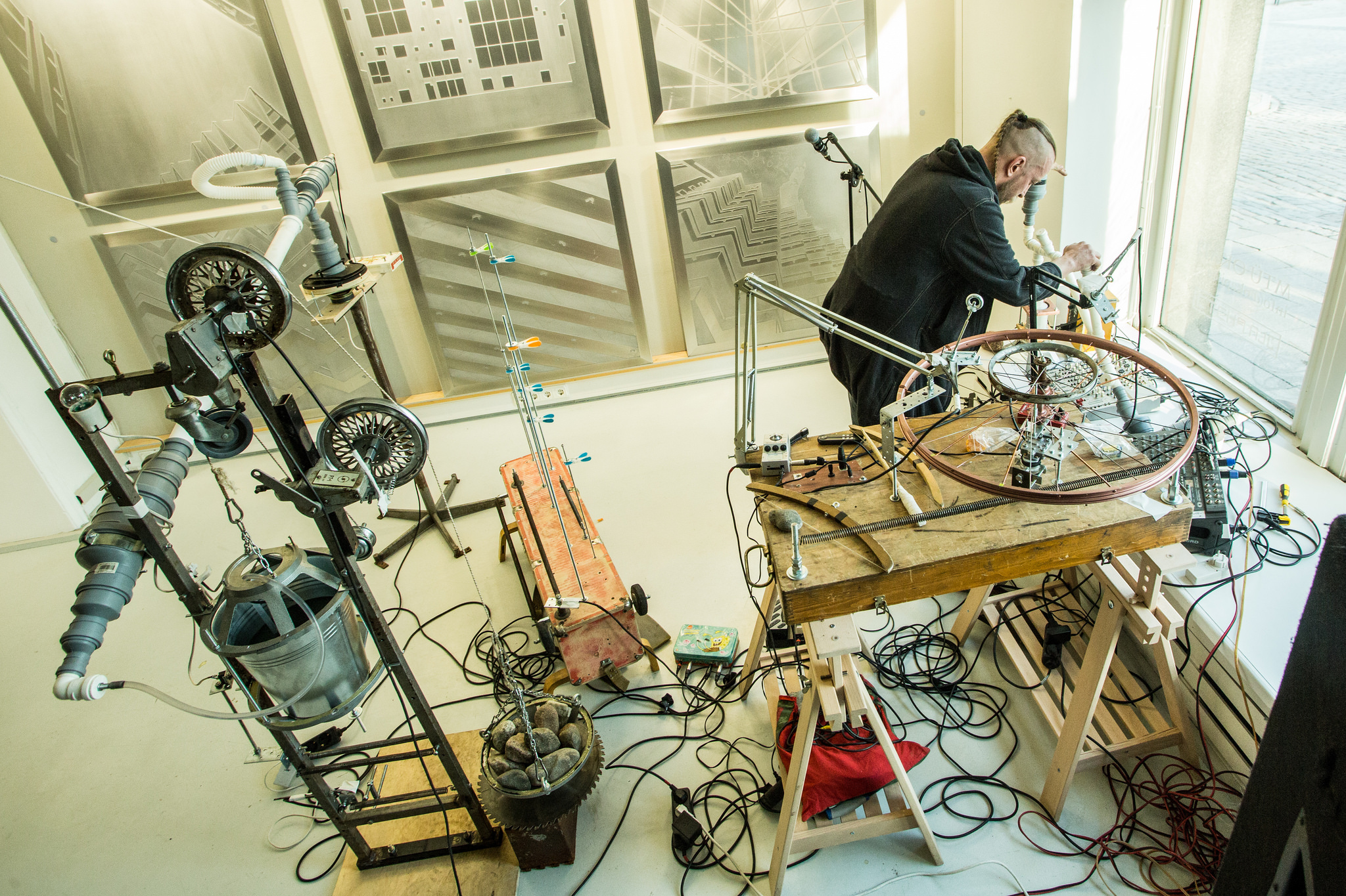 TMW Arts avamine